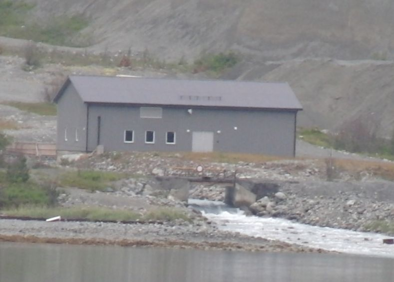 Forneselva kraftverk